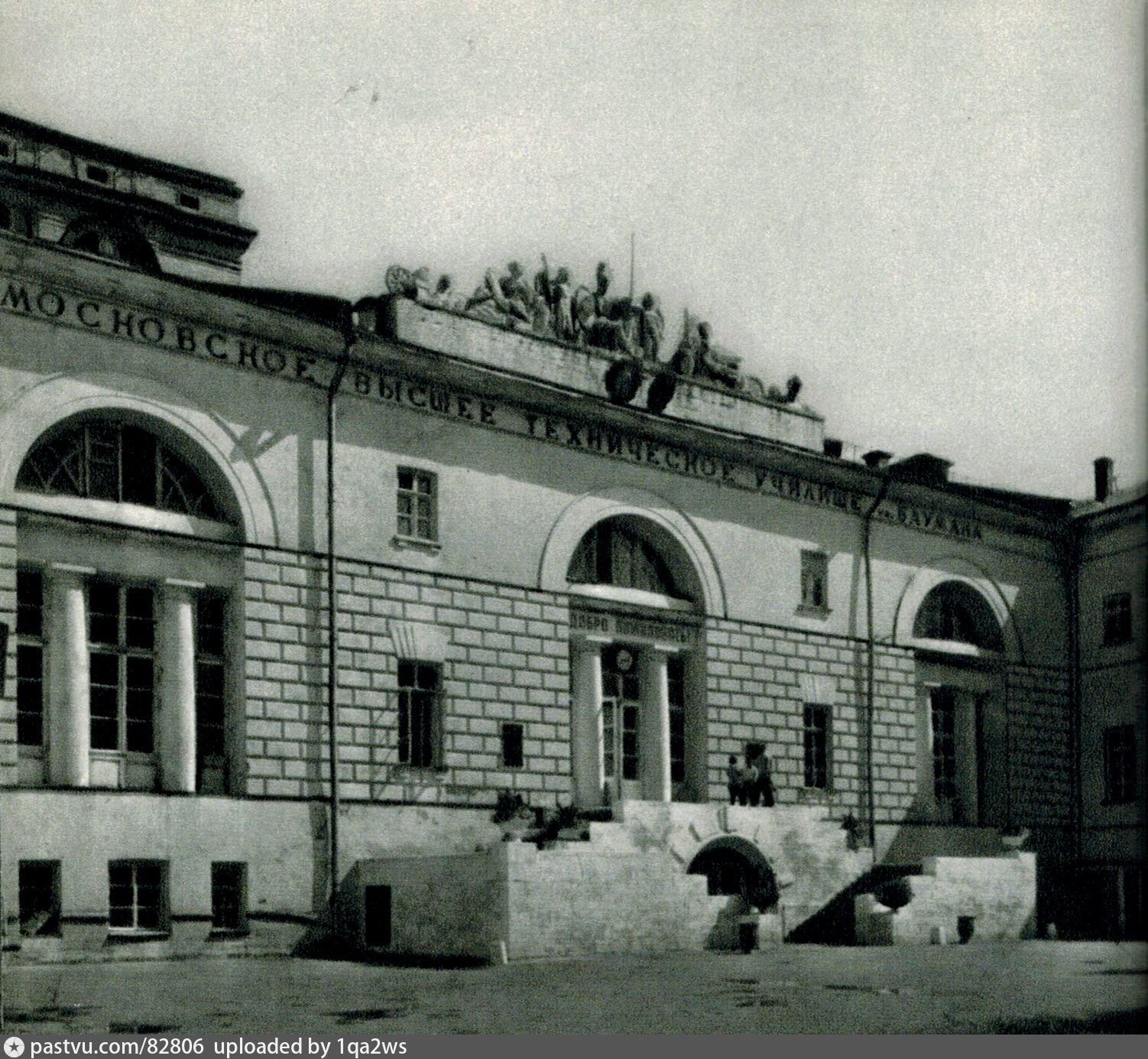 Аттик центрального фасада Слободского дворца